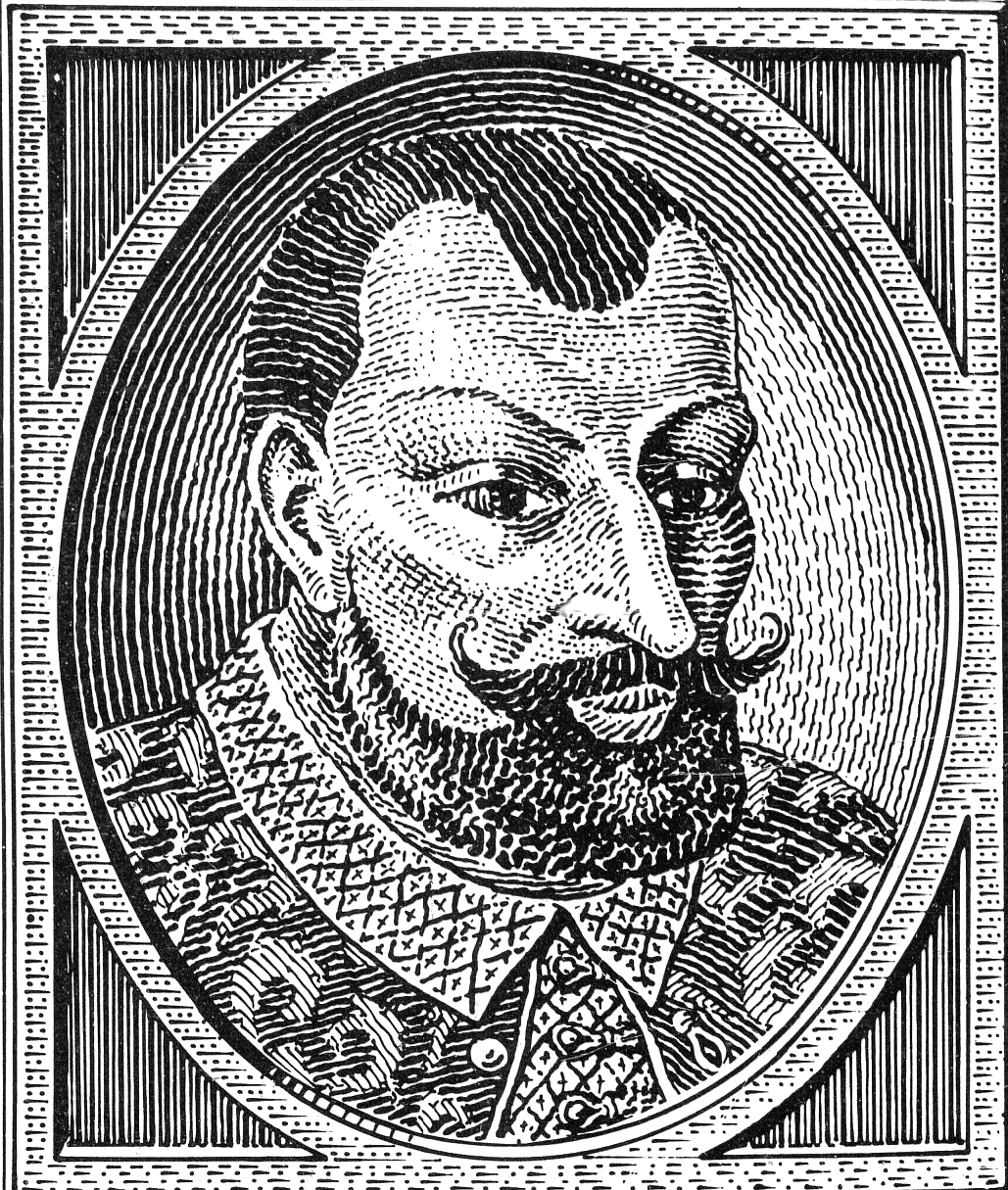 Ferenc Nádasdy portrait